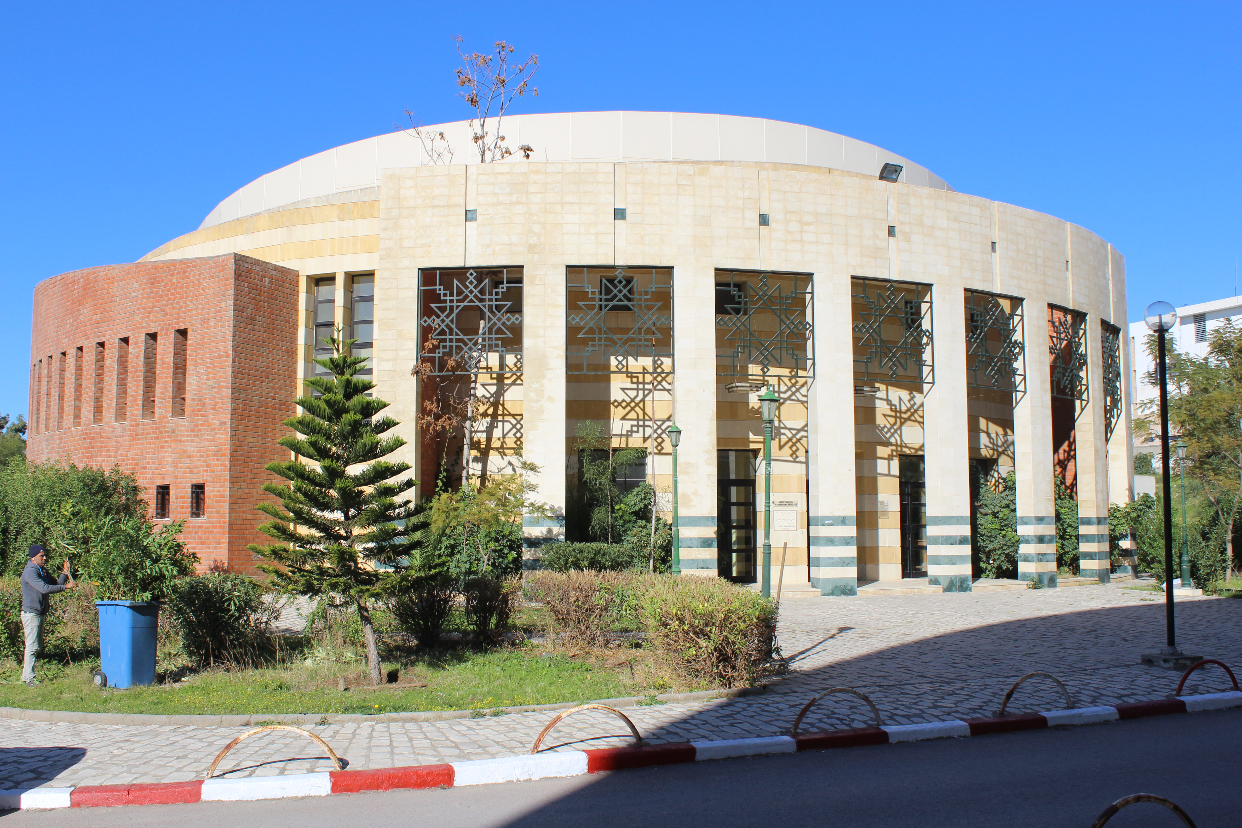 Amphitheatre cérémonial